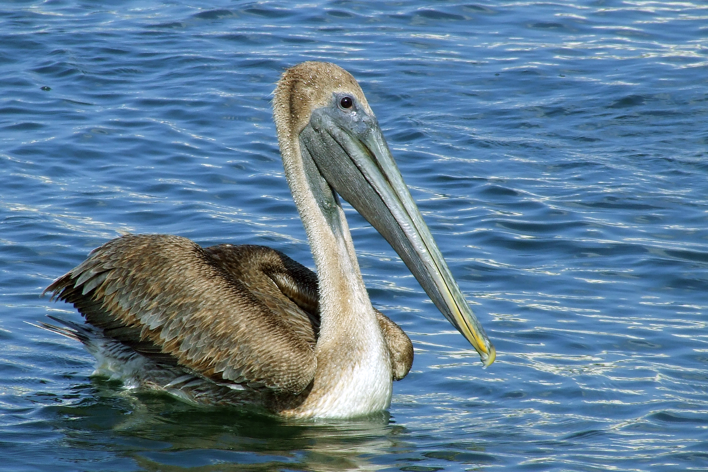 Brown pelican (Pelecanus occidentalis) juvenile, at Almendares river, Havana, Cuba.